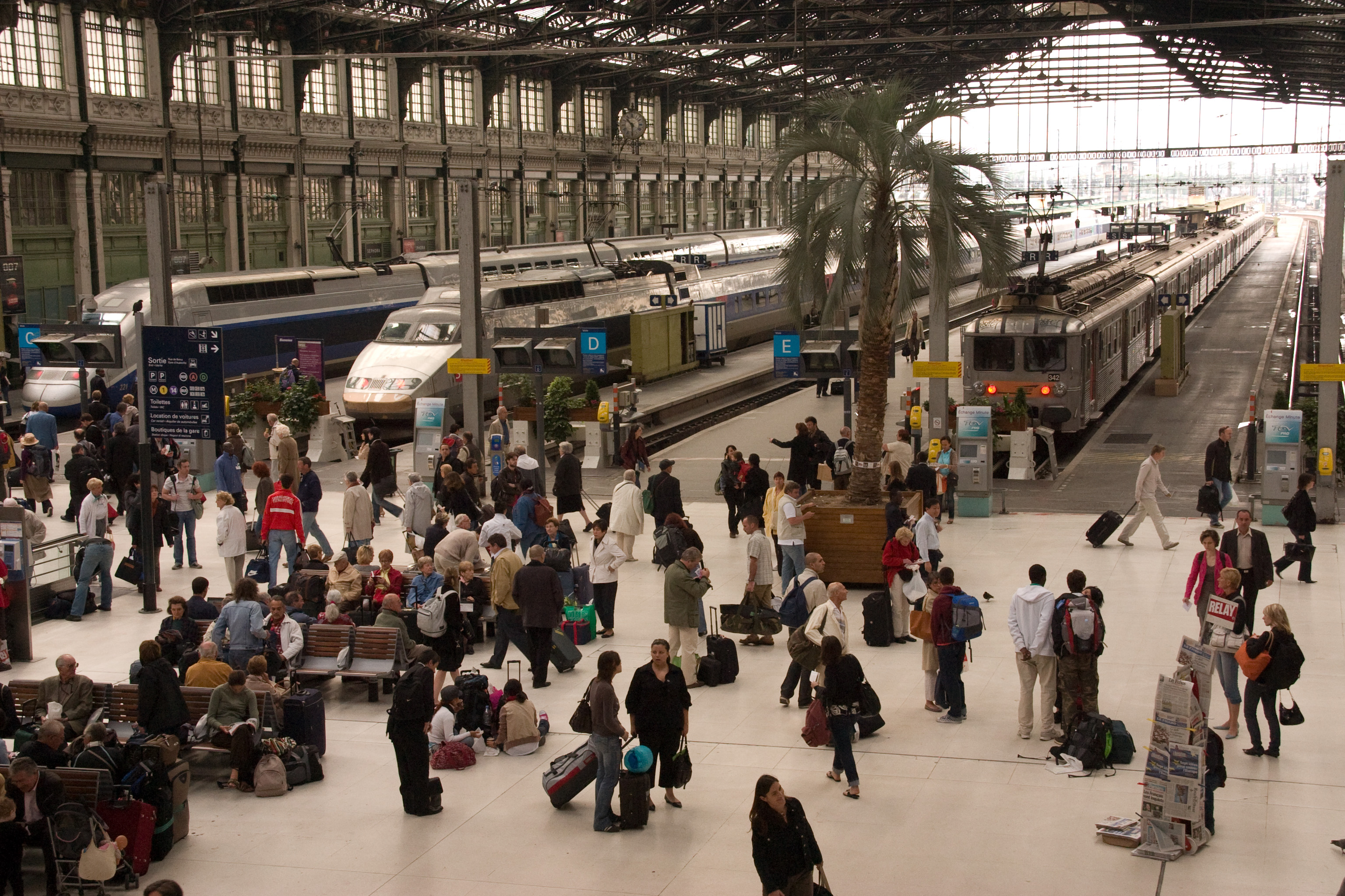 Gare de Lyon, Paris, France